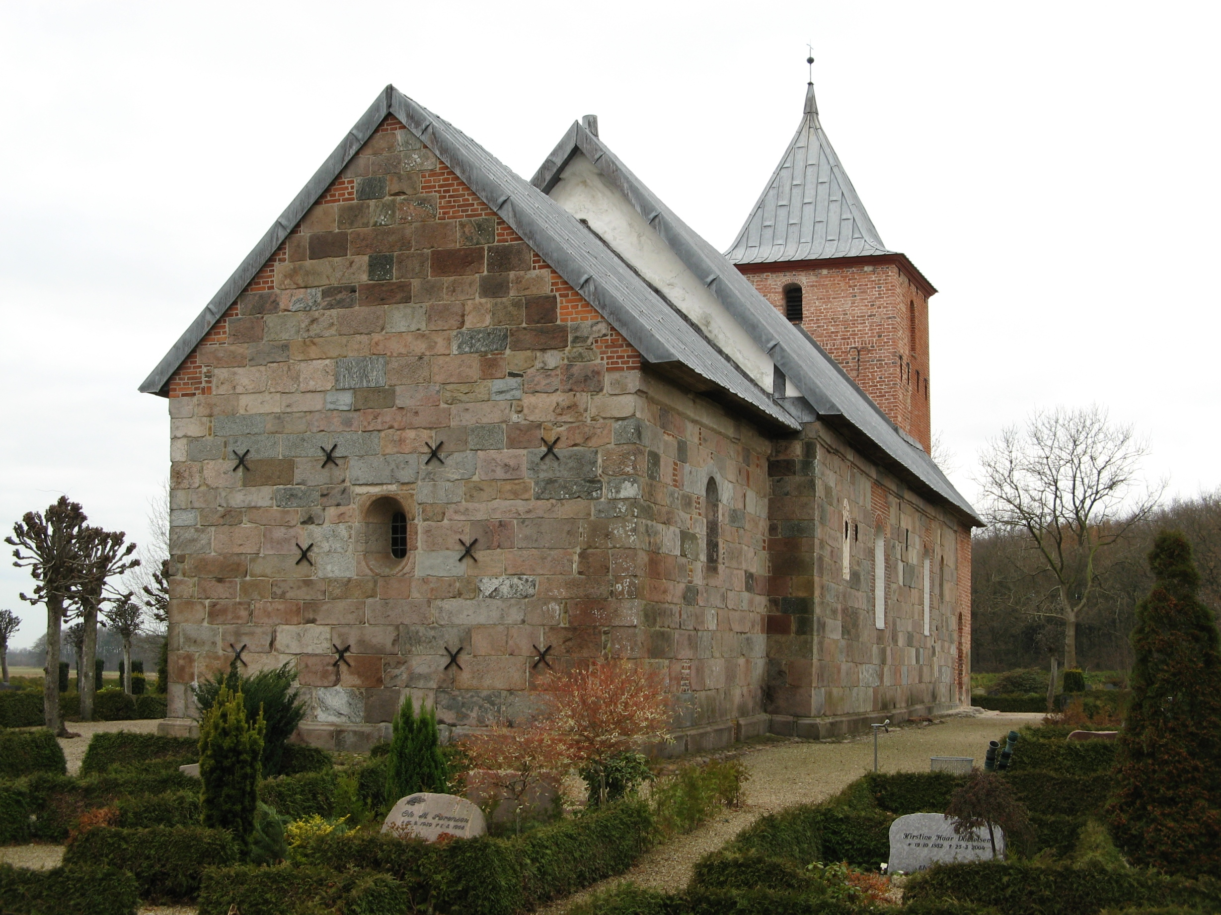 Vester Nykirke, Vester Nykirke sogn, Esbjerg kommune (former: Skads Herred, Ribe Amt). Kirken set fra øst